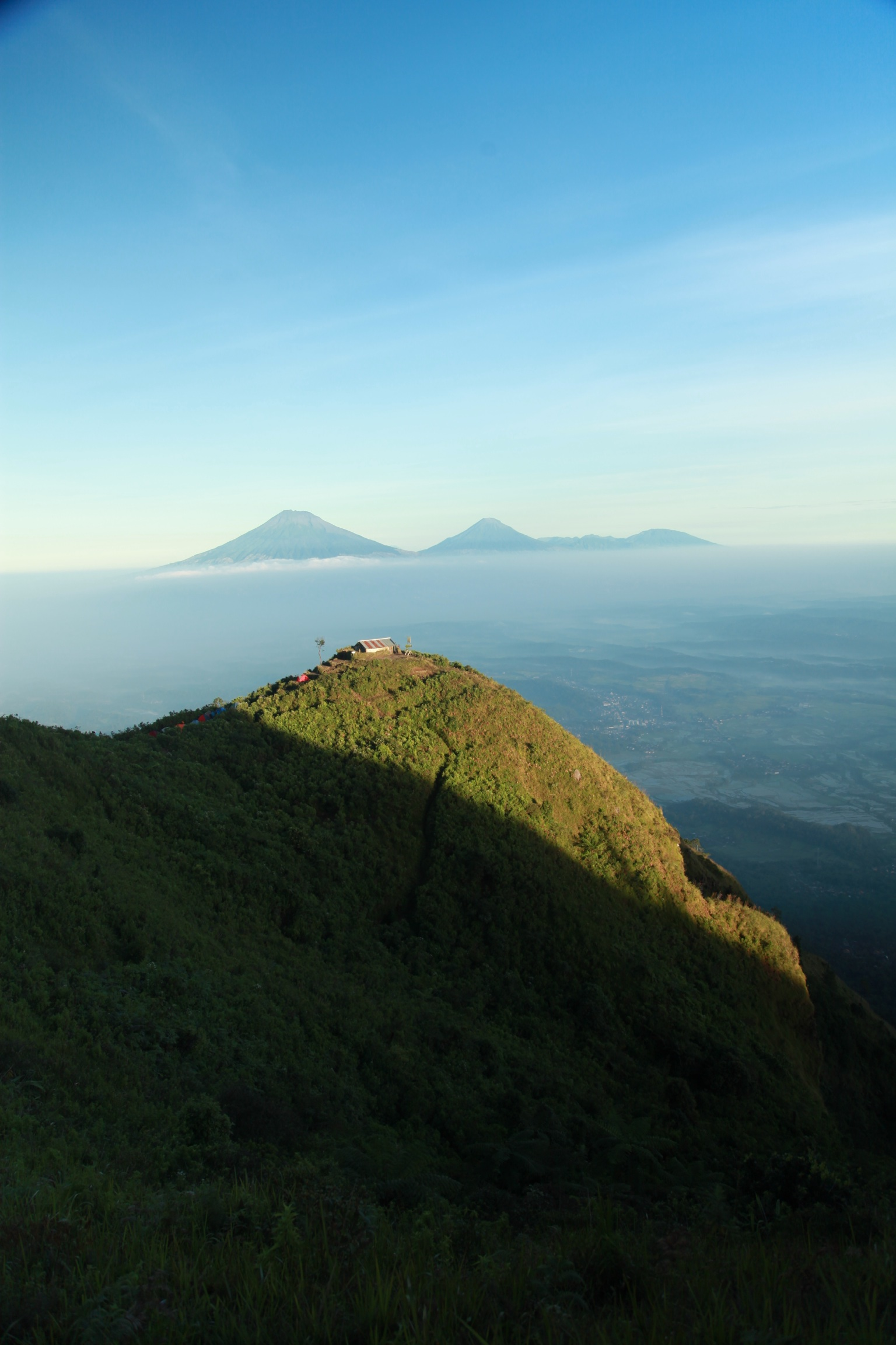 Gunung Andong adalah sebuah gunung bertipe perisai di Kabupaten Magelang, Jawa Tengah. Gunung ini belum pernah mempunyai aktivitas meletus. Gunung Andong terletak di antara Ngablak dan Tlogorjo, Grabag dan berketinggian sekitar 1.463 m. Gunung Andong merupakan salah satu dari beberapa gunung yang melingkari Magelang. Berdampingan dengan gunung Telomoyo, gunung ini berada di perbatasan wilayah Salatiga, Semarang, dan Magelang